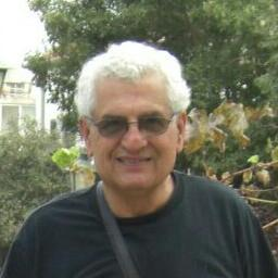 תמונה של בן ציון יהושע